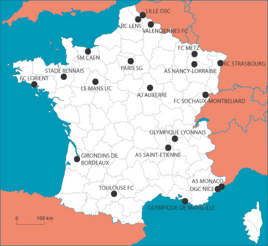 localisation des clubs de football participant au championnat de France de Ligue 1 2007-2008/localisation of soccer clubs taking part in the french championship Ligue 1 2007-2008